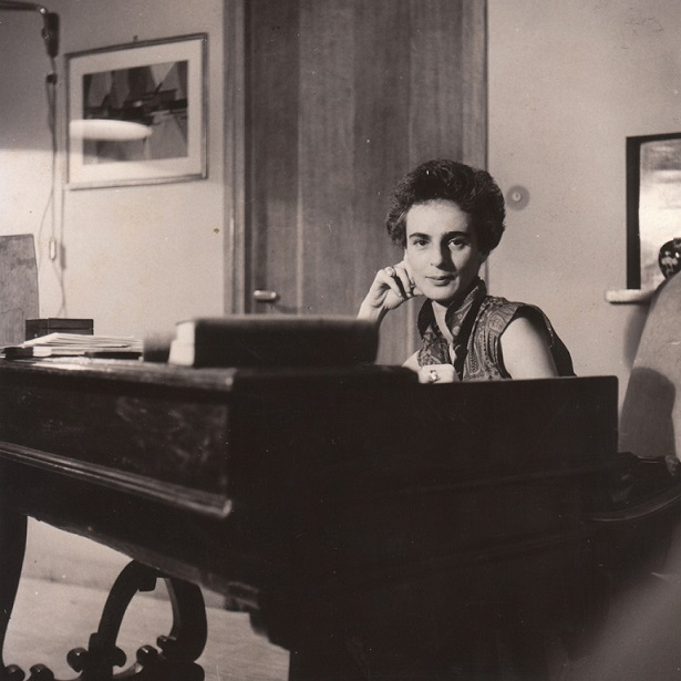 Brianna Carafa